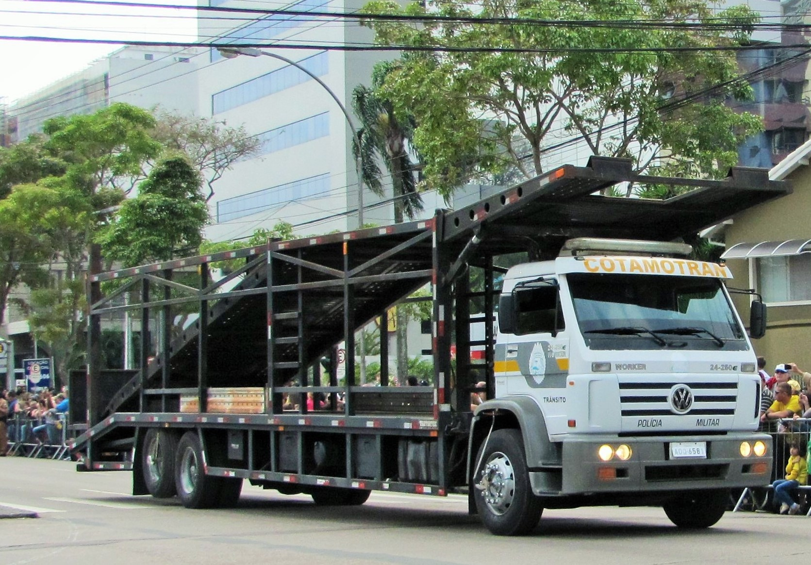 Viatura para transporte de veículos pertencente à Polícia Militar do Paraná.